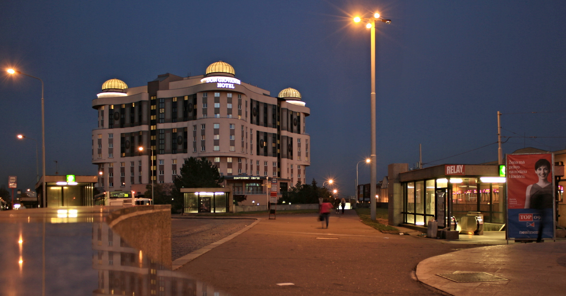 Praha, Želivského, hotel Don Giovanni a metro